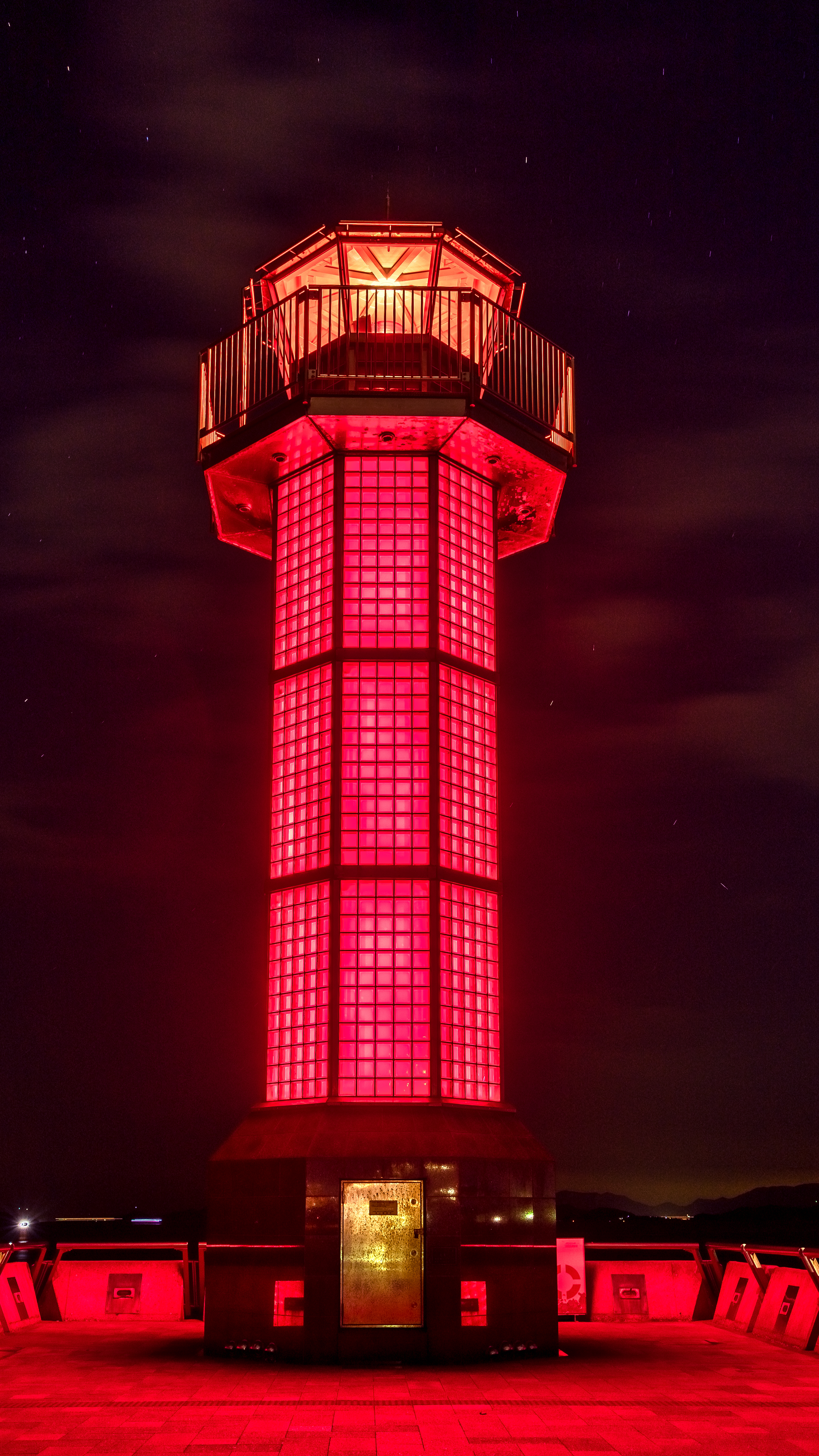 Takamatsu Red Lighthouse